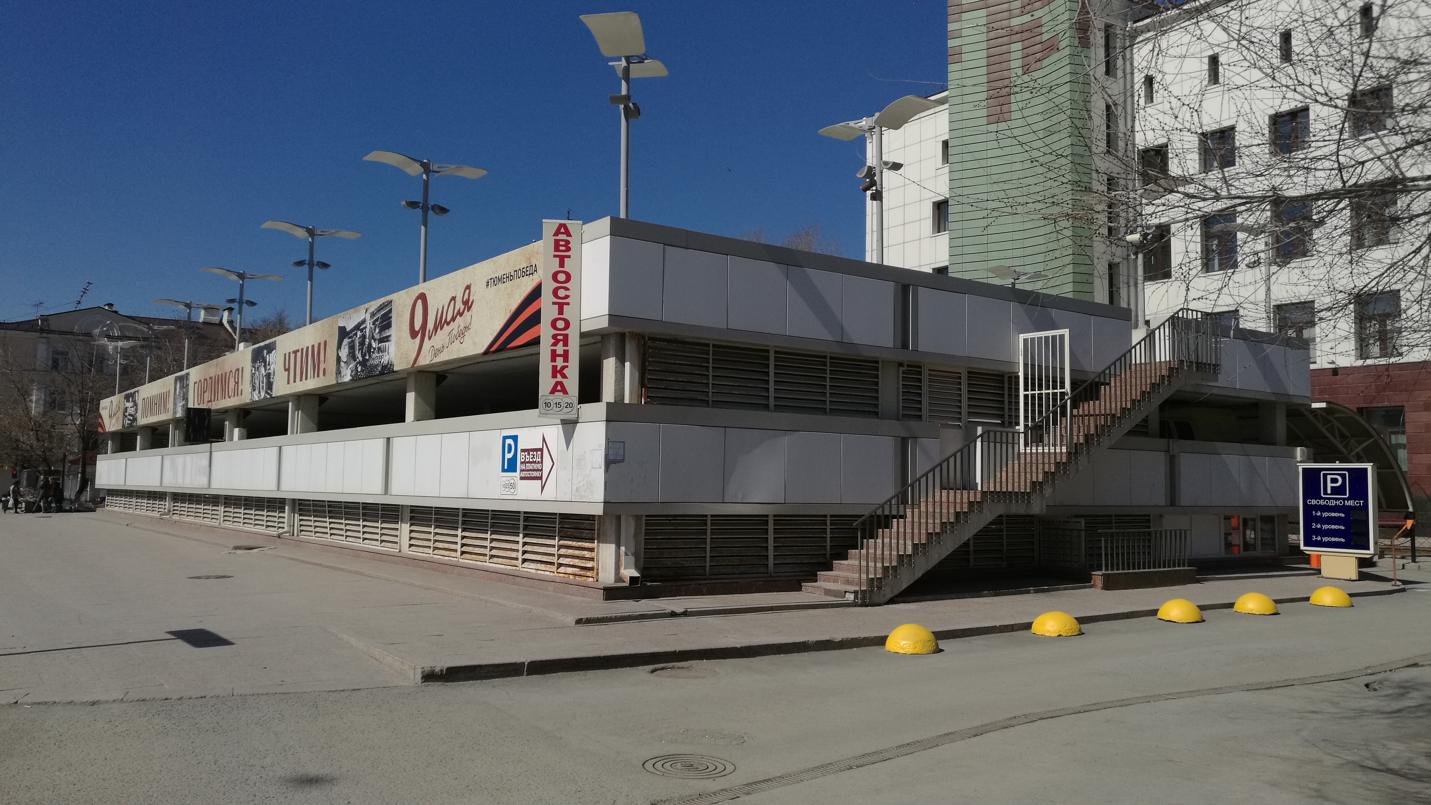 Parkumejo en strato Lenin. Tjumeno, Rusio.